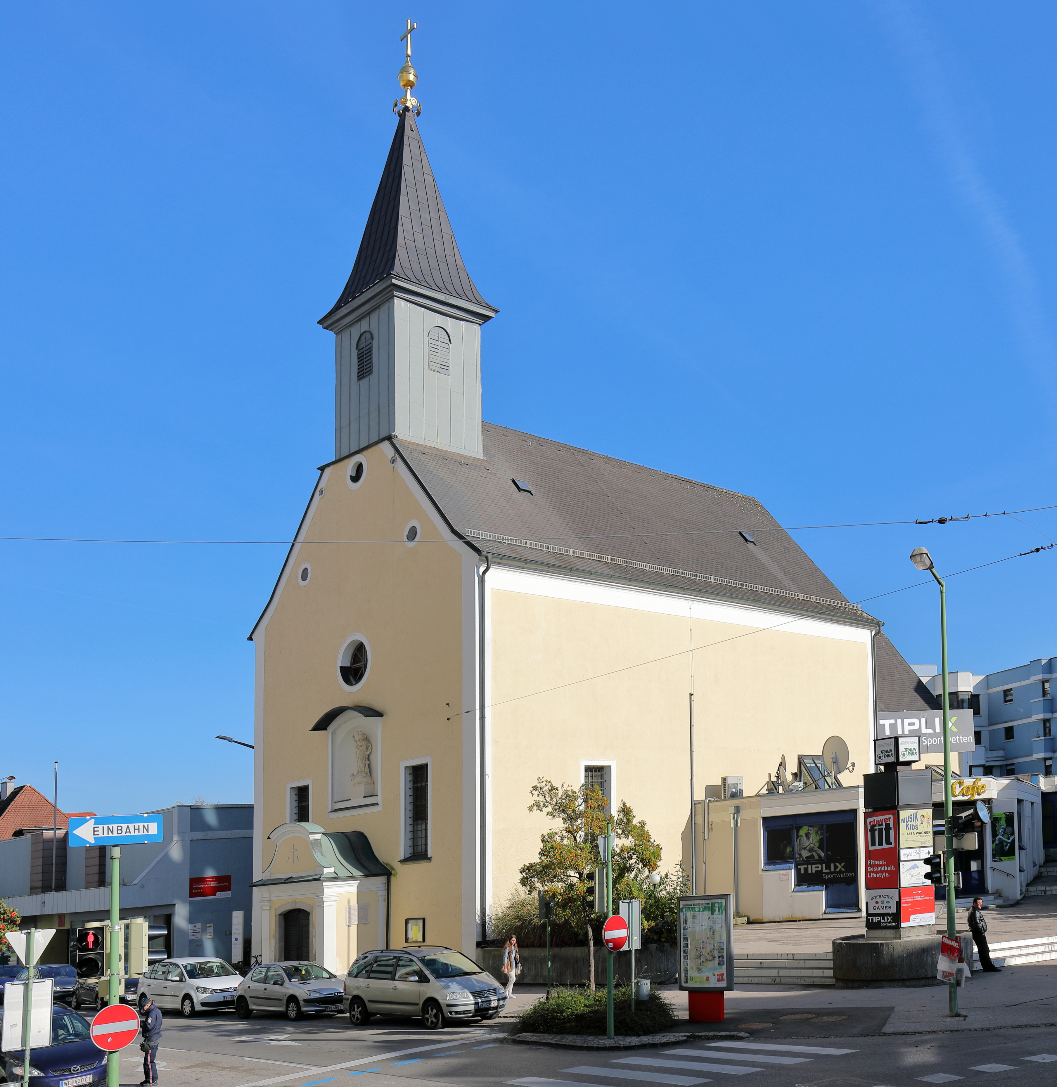 Westansicht der Marienkirche in der oberösterreichischen Stadt Wels.Die Kirche wurde von 1630 bis 1631 als Klosterkirche des Bettelordens der Kapuziner errichtet und dem hl. Bonaventura geweiht. Im Zuge der josephinischen Pfarrregulierung wurde das Kloster 1785 aufgelöst und die Kirche zu einer Pfarrkirche erhoben und auf Mariae Verkündigung geweiht. Um die 18./19. Jahrhundertwende erhielt die einschiffige Kirche einen neuen Glockenturm und das Dach wurde zur heutigen Form erhöht. 1825 ersetzte man den hölzernen Vorbau durch ein gemauertes Portal. Zwei Jahre danach wurde über dem Kirchenportal eine Nische geschaffen, die seit 1959 eine Darstellung der Maria Immaculata beherbergt.